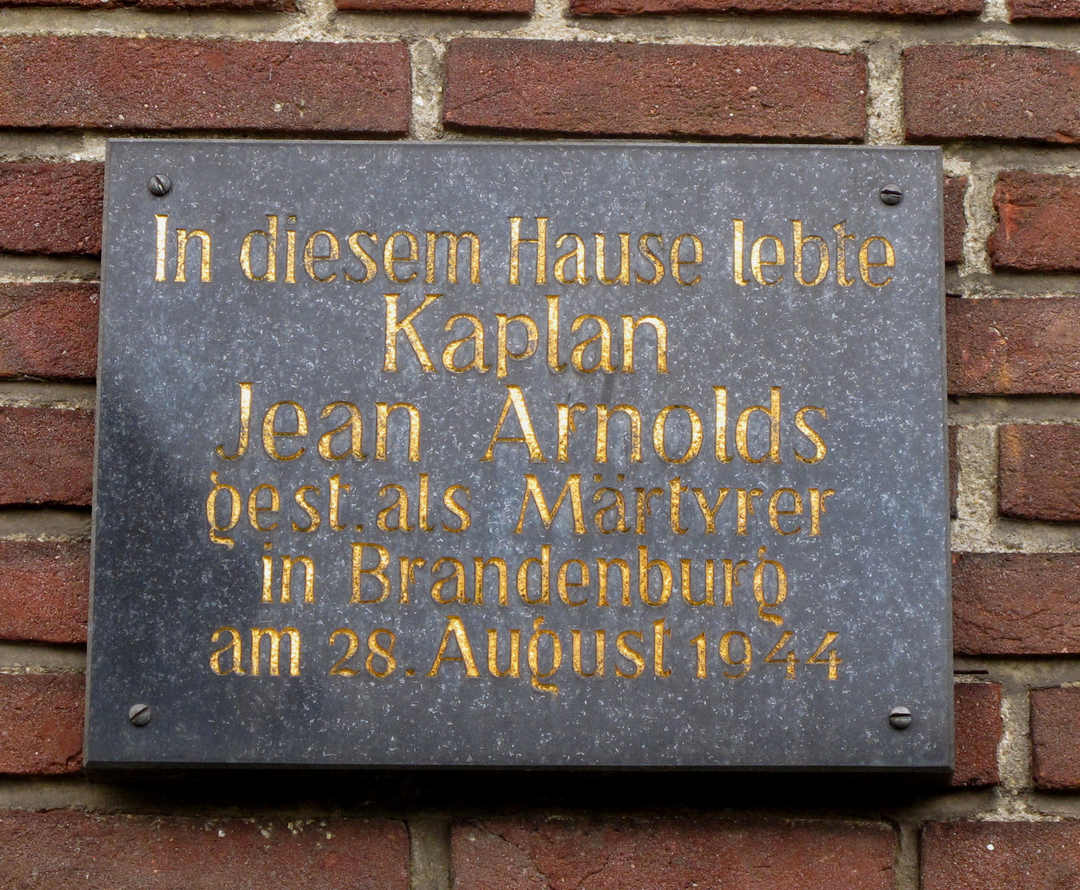 Gedenktafel am Wohnhaus des Kaplan Jean Arnolds, Kirchgasse in Eupen, Belgien